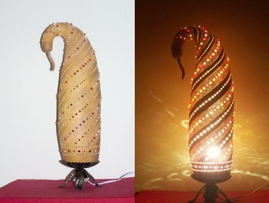 Çeşm-i Bülbül modeli sukabağı lamba Sanatçı=Nurettin Taşkaya Foto=Nurettin Taşkaya Kaynak=